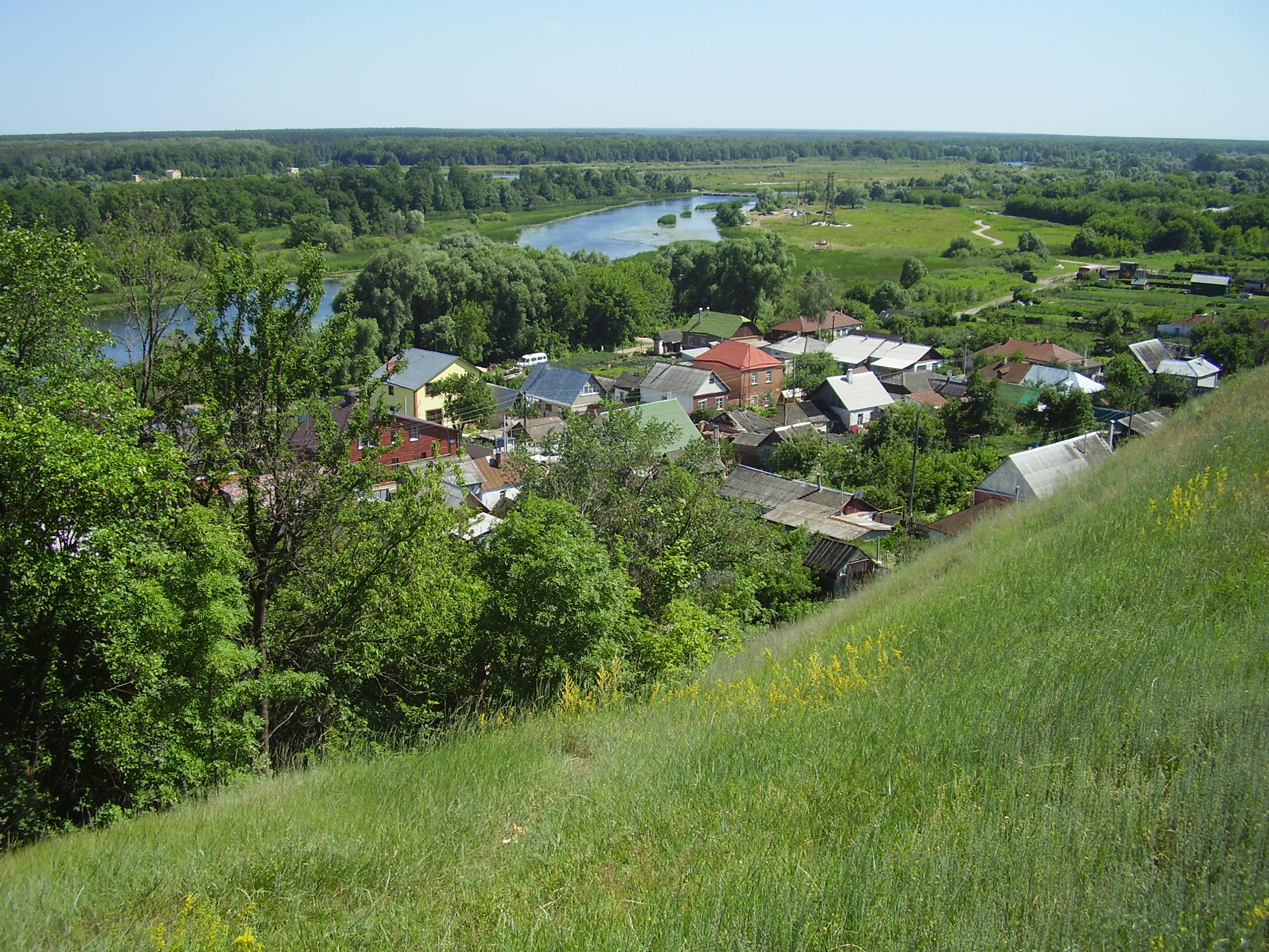 Рамонь.Вид на реку Воронеж